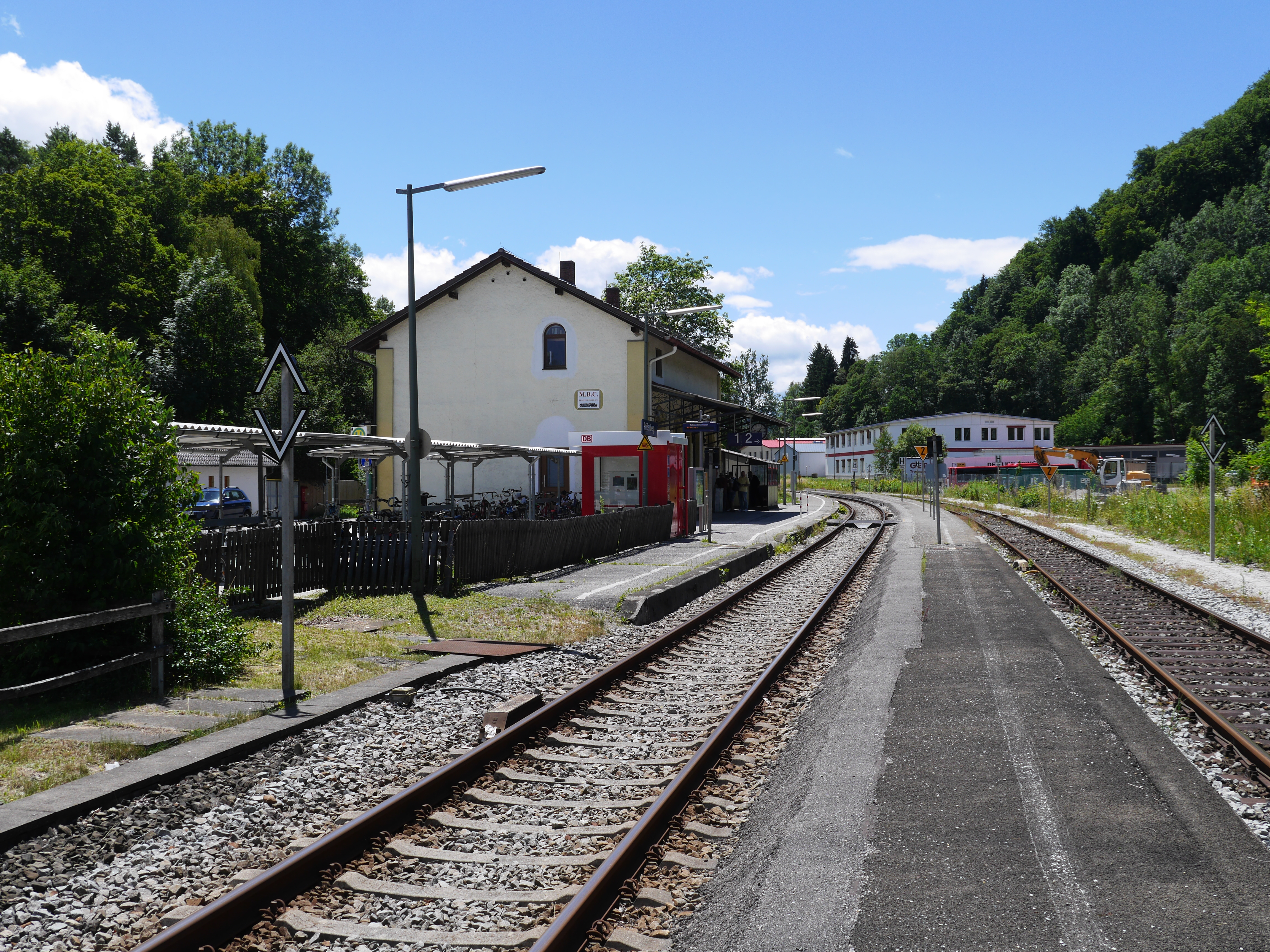 Haus- und Zwischenbahnsteig des Bahnhofs Peißenberg, im Hintergund das Empfangsgebäude, davor das Video-Reisezentrum